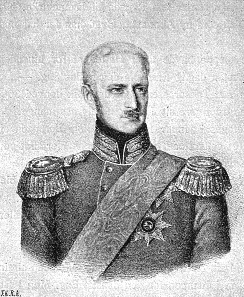 Frederik Emil August, prins af Nør (23. august 1800 - 2. juli 1865) var søn af Frederik 6.s søster Louise Augusta og hertug Frederik Christian af Augustenborg.